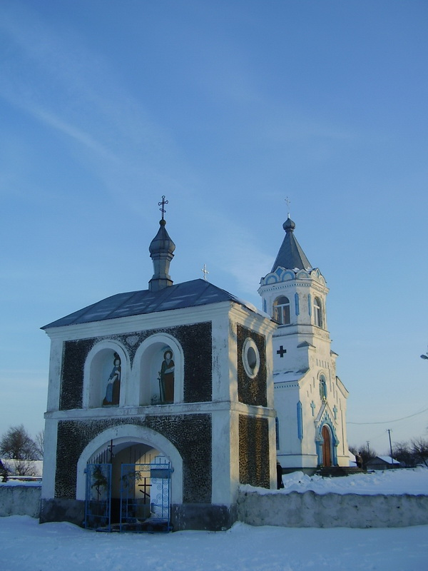 Міжэрычы. Царква Святой Ганны